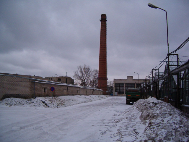 Rabaküla tänav. Kadaka asum. Tallinn